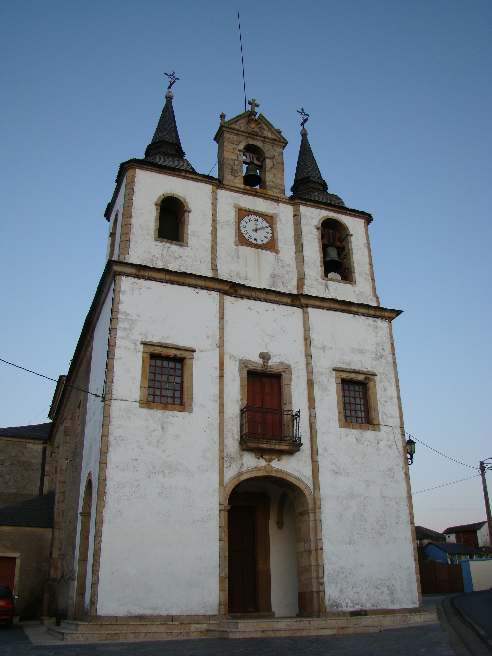 Iglesia de Santa Marina en Puerto de Vega (Asturias, España)